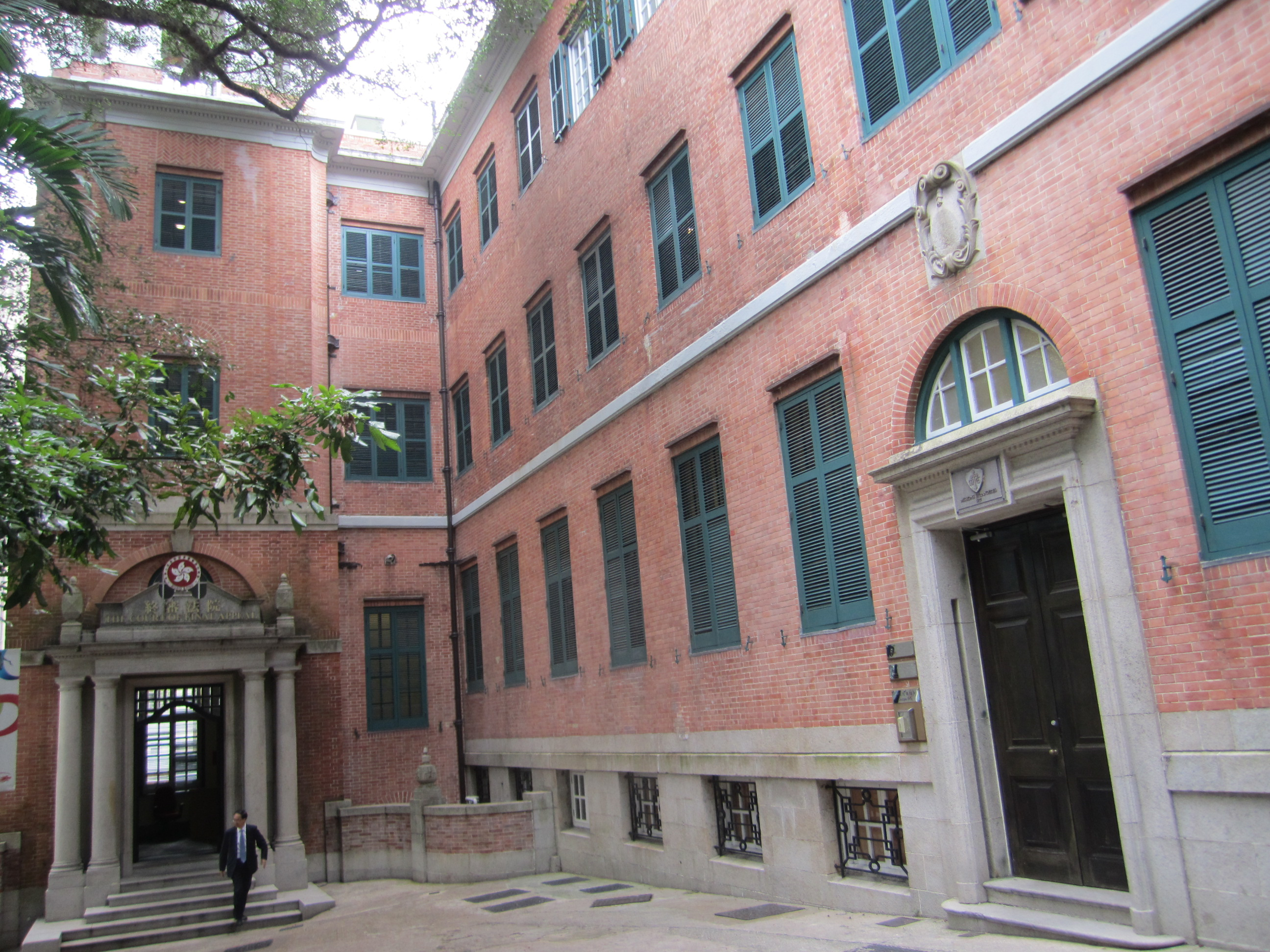 前法國外方傳道會大樓